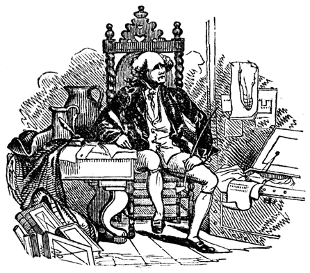 Заставка американского журнала "Никербокеруточнить" за 1844 год